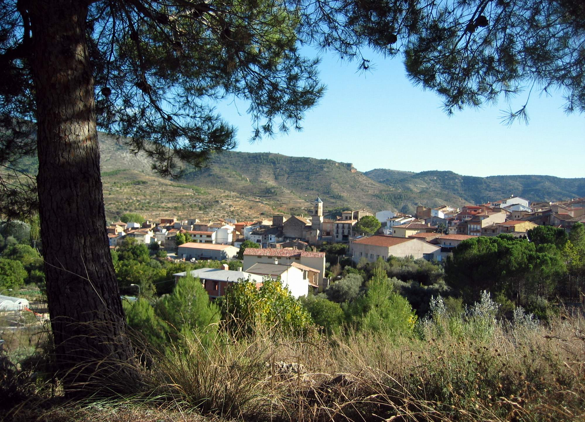 Vista parcial del caserío de Casasaltas (Valencia), desde la CN-330a.